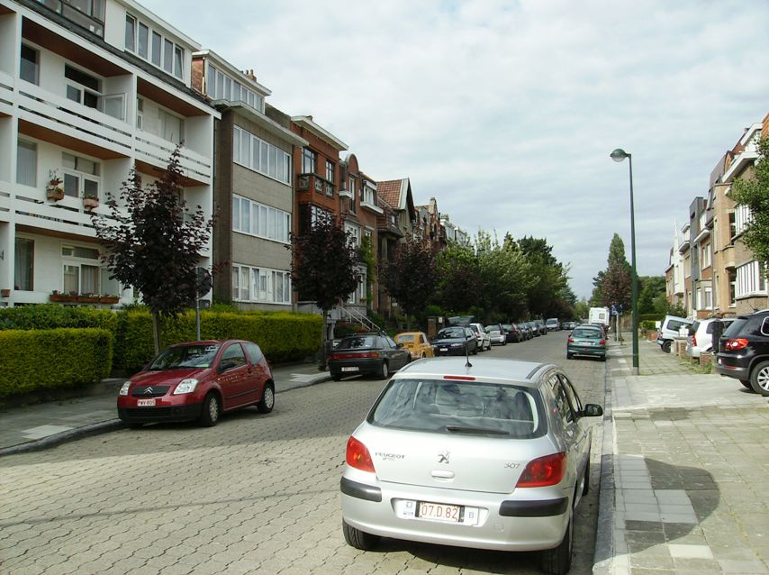 Av Geyskens Auderghem Belgium - part 2